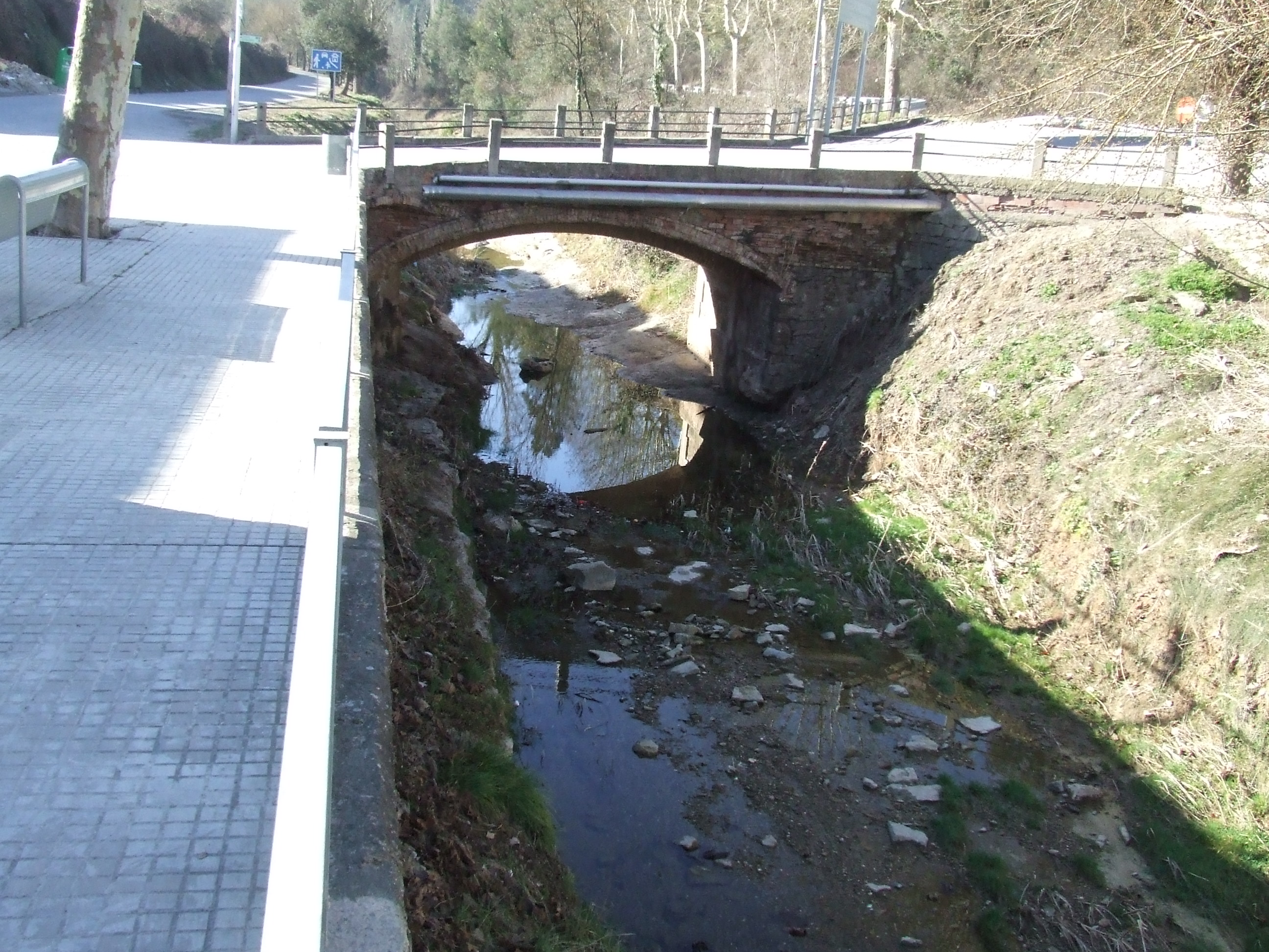 El Pont del Solà (Monistrol de Calders, Moianès)